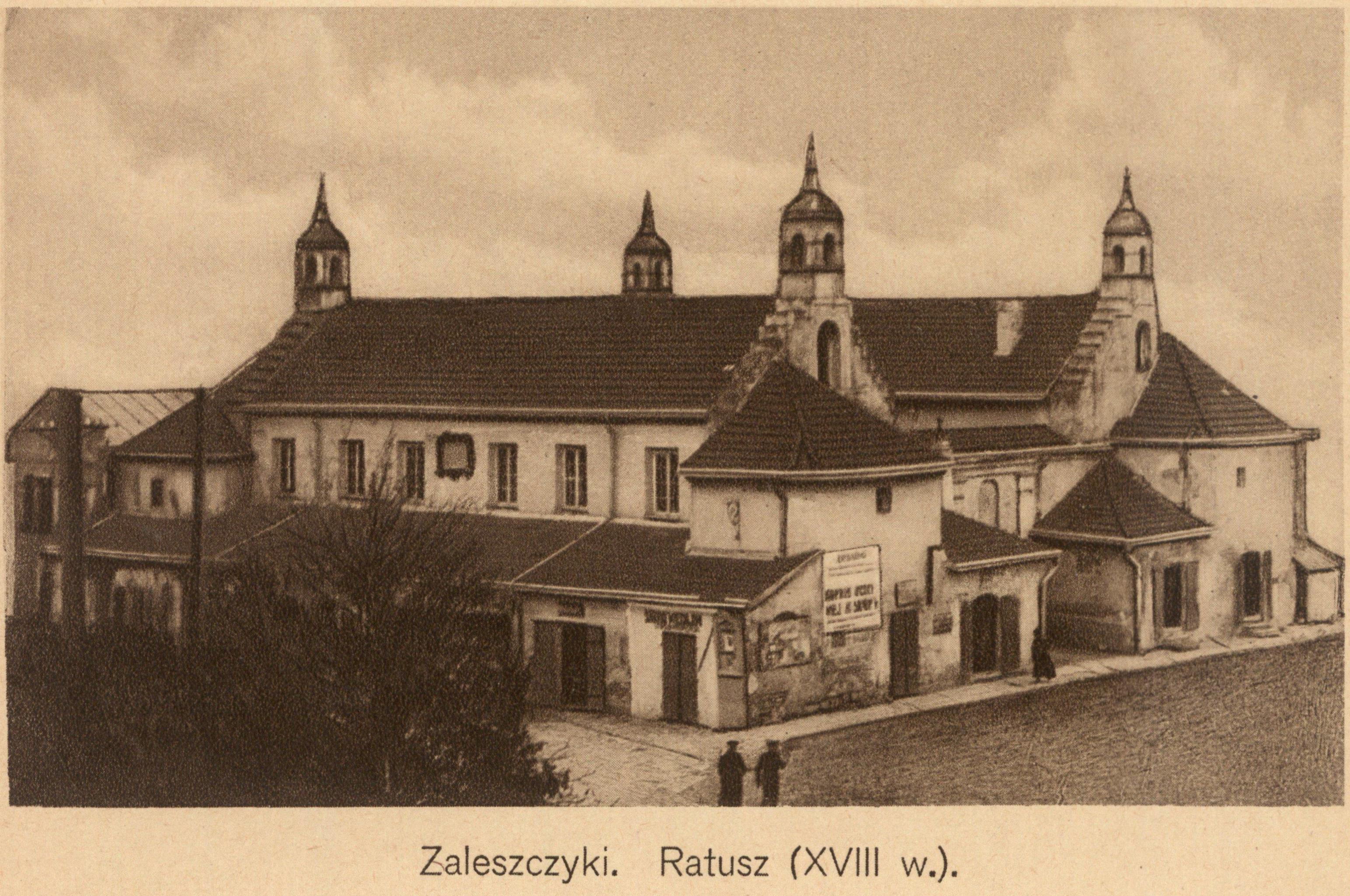 Ратуша в Заліщиках на початку ХХ ст.